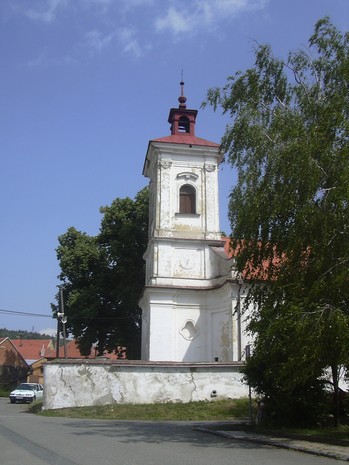 Kostel Nejsvětější Trojice, Habrovany (Vyškov District, Czech Republic)